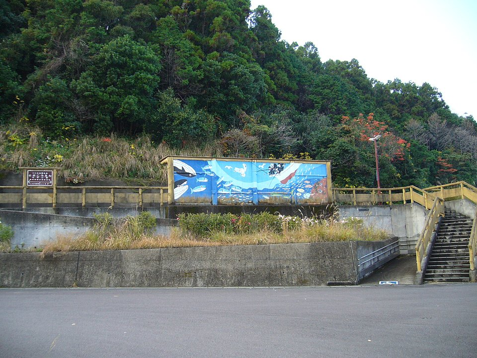 佐賀公園駅 外観 2006年12月13日 Bakkai撮影